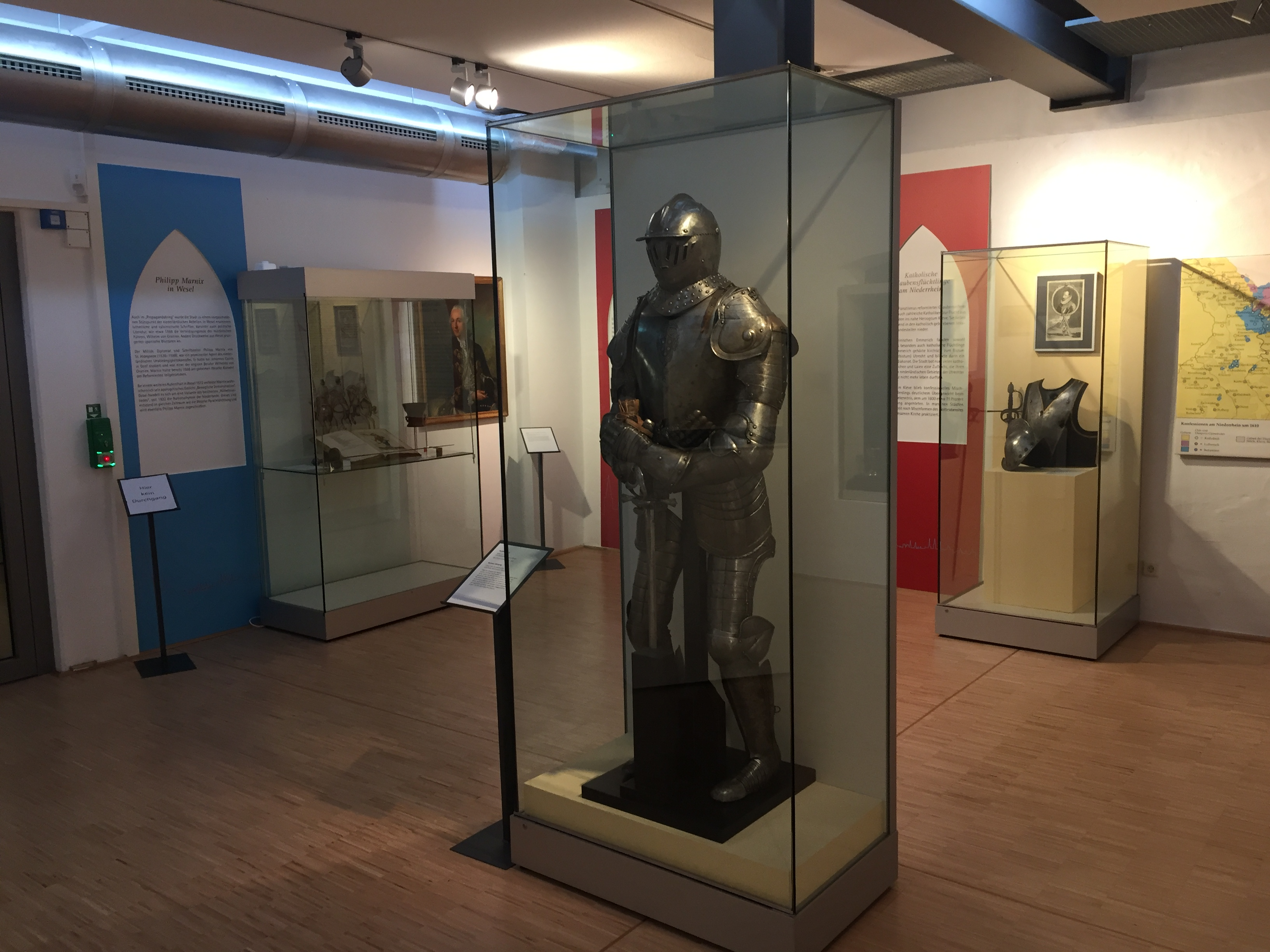 Blick in einen Teil der Ausstellung.